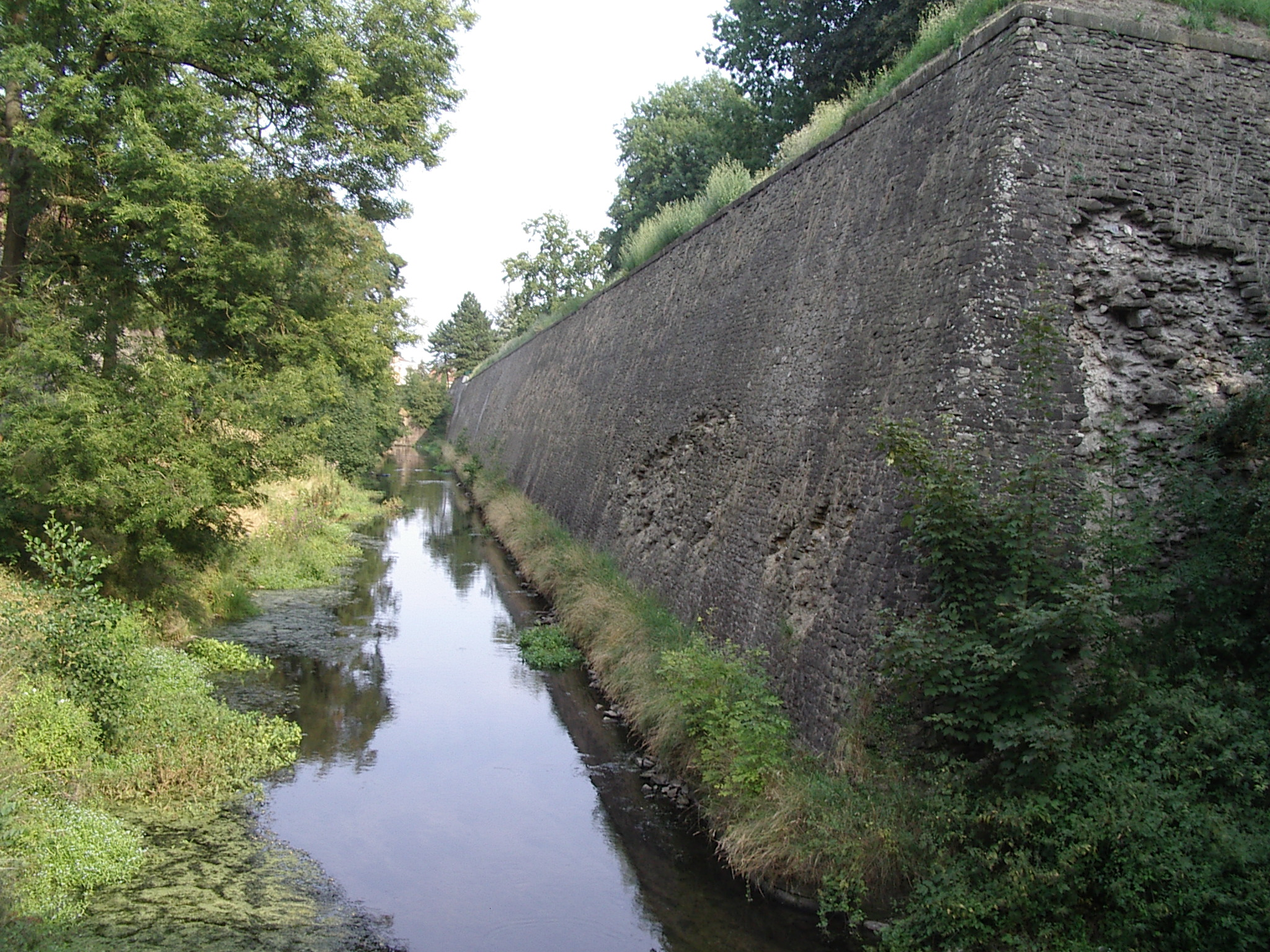 Les remparts de Condé-sur-l'Escaut